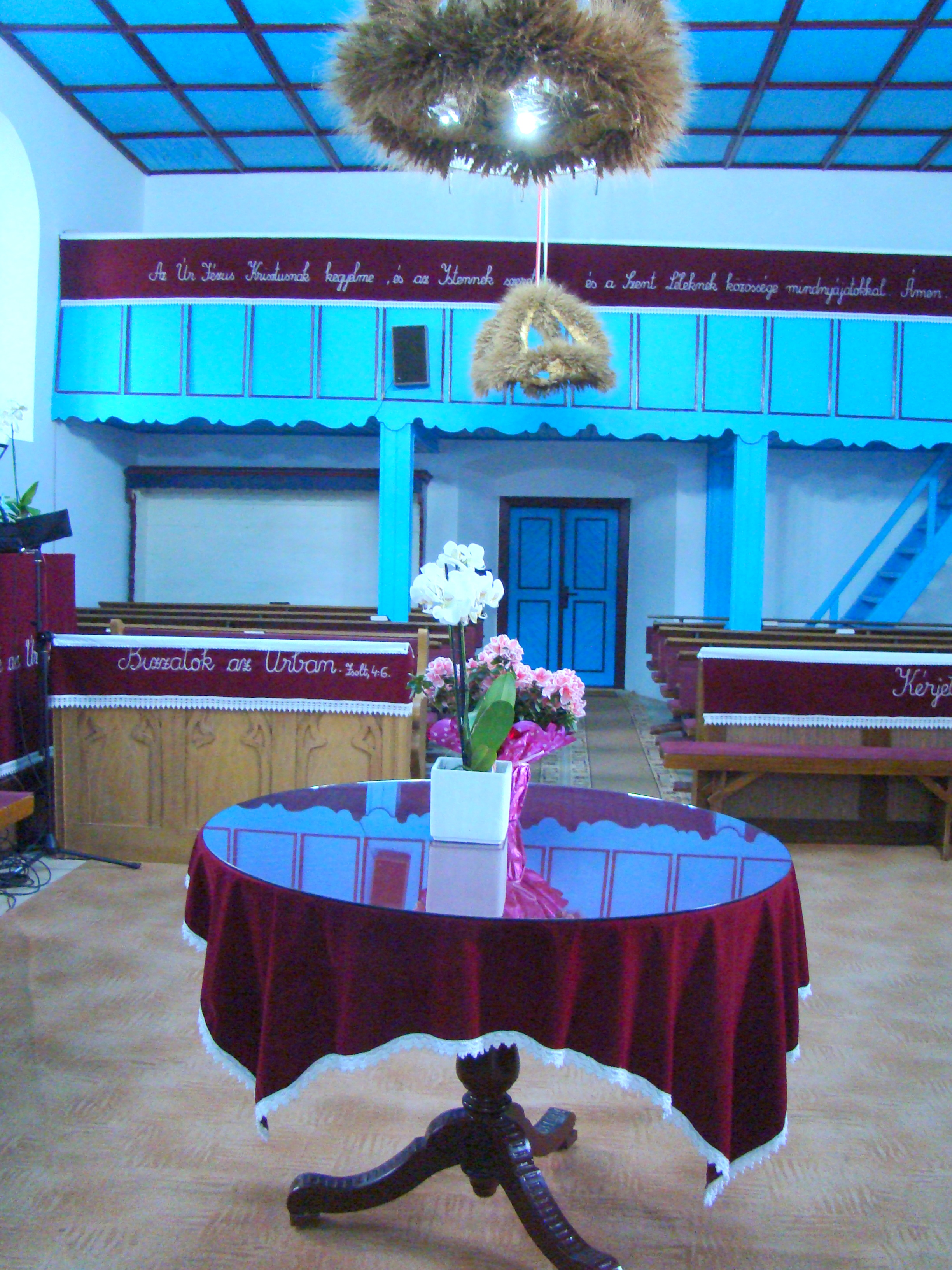 Biserica reformată, sat Fântânele; comuna Matei 01